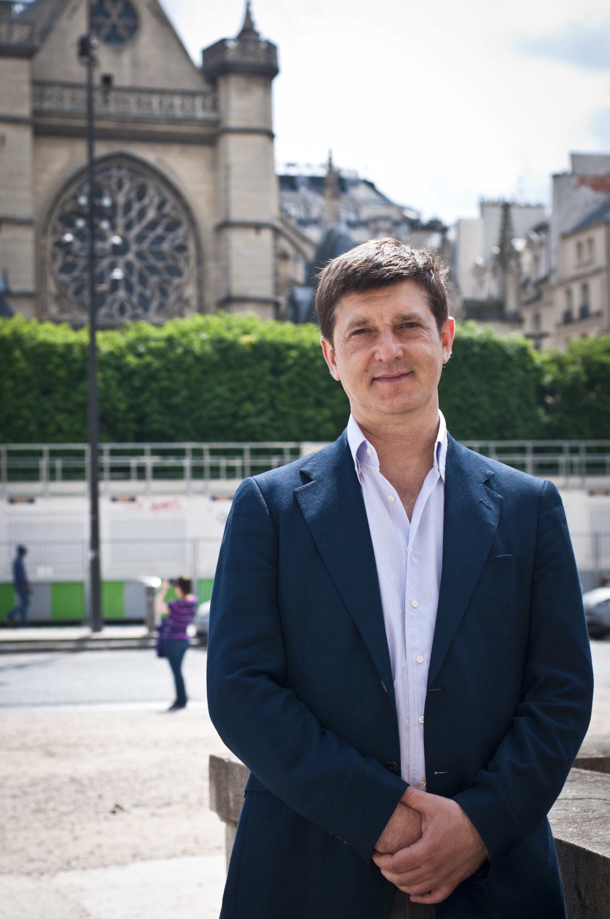 Дмитрий Кузьмин борется за европейский ценности и другие пункты программы Общеевропейской партии ЛЮБОВЬ.